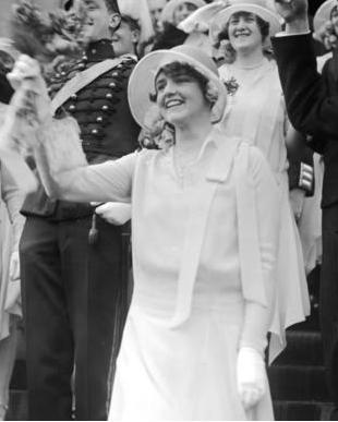 Die feierliche Trauung des Fürsten Otto von Bismarck, dem Enkel des Altreichskanzlers, mit Frl. Tengboom aus Schweden, im Berliner Dom! Anwesend waren der Herr Reichspräsident, sowie Mitglieder der Reichsregierung und der schwedischen Botschaft in Berlin! Hochzeitsgäste winken von der Freitreppe des Berliner Domes dem abfahrenden Brautpaar zu.